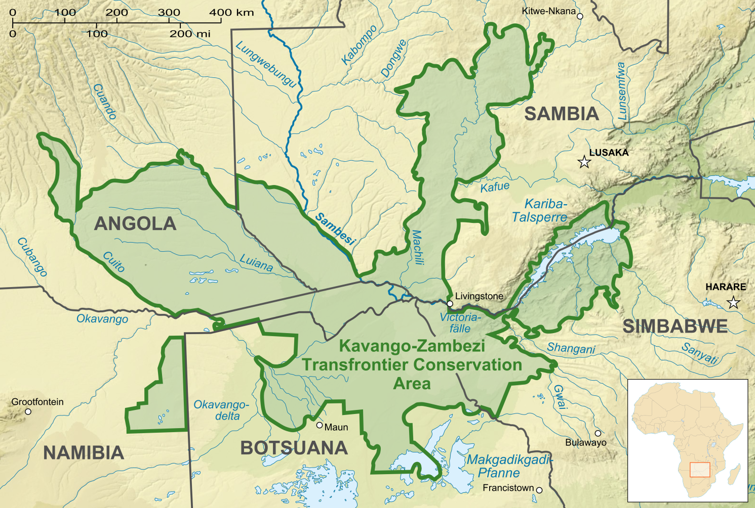 Karte des Kavango-Zambezi Transfrontier Conservation Areas